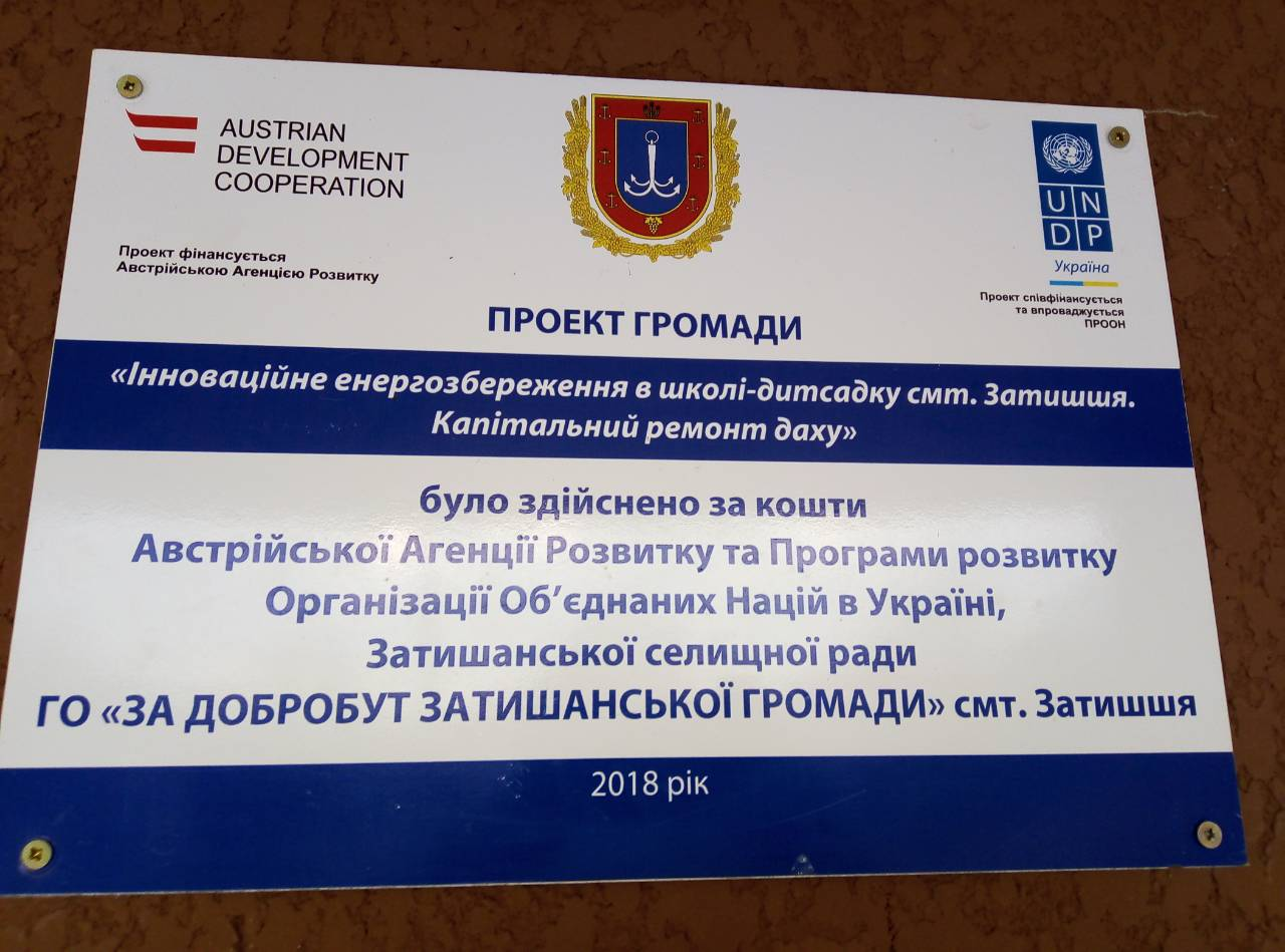 Інформтабличка на НВК, Затишшя